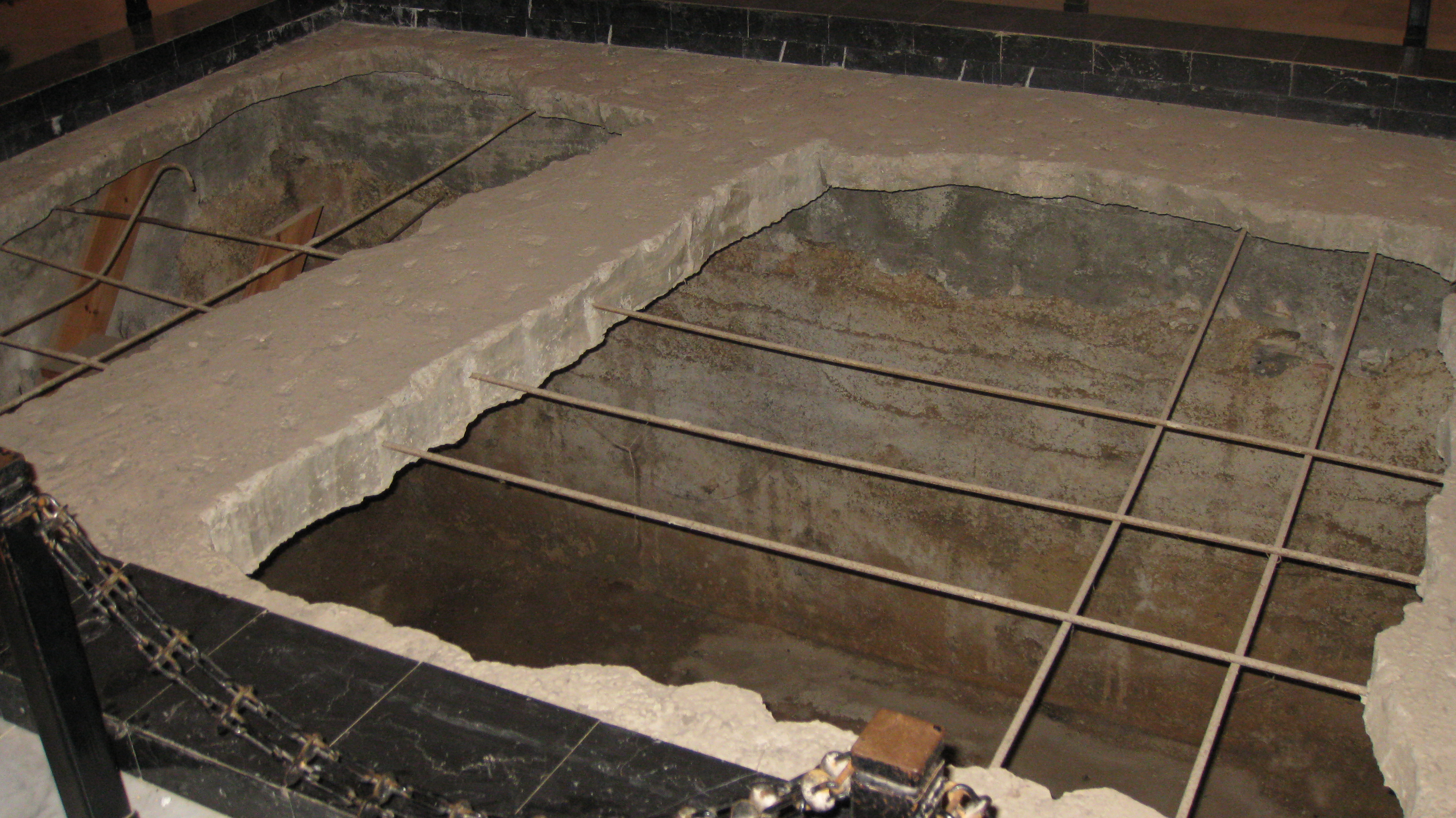 Kfar Etzion כפר עציון Kfar Etzion Memorial אתר ההנצחה בגוש עציון